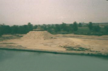 Suez channel in may 1982